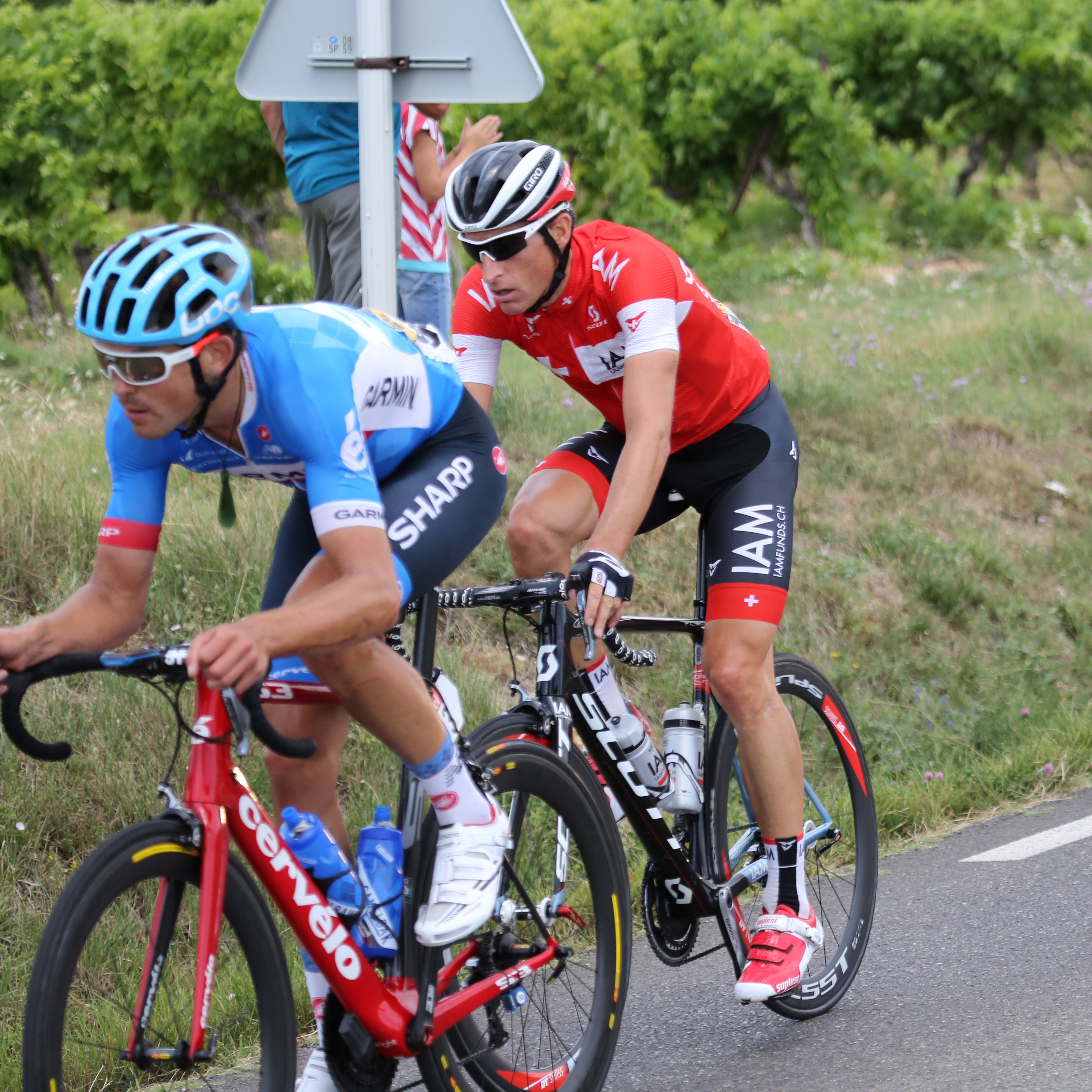 Das Fluchtduo mit Jack Bauer und Martin Elmiger auf der Route de Roussillon (D2) während der 15. Etappe der Tour de France 2014